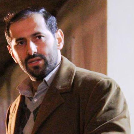 ولی داداشی در حین سخنرانی تبلیغاتی انتخابات اسفند ۱۳۹۴